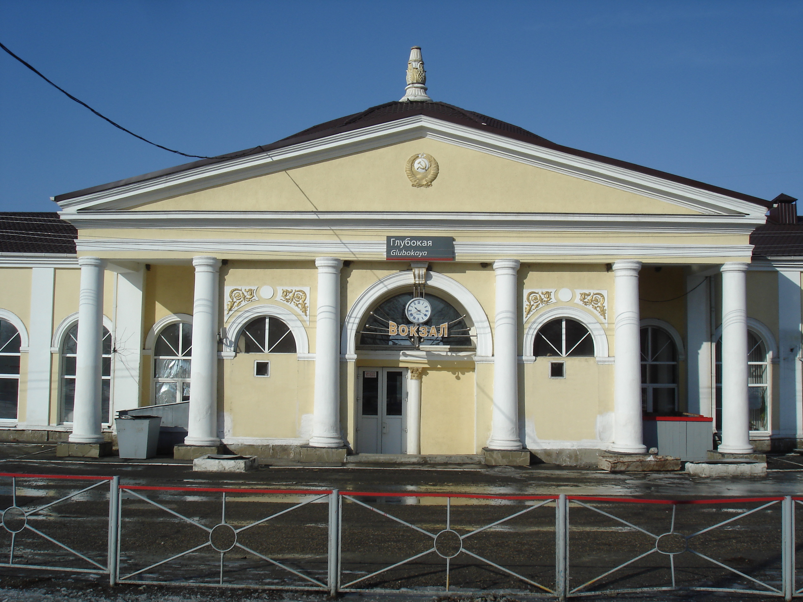 Посёлок Глубокий, Ростовская область - железнодорожный вокзал вид с привокзальной площади.